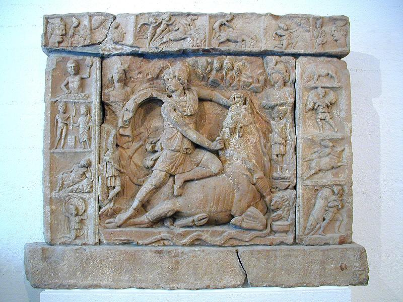 Mithrasrelief von Neuenheim, 2. Jhrdt . Badisches Landesmuseum Karlsruhe